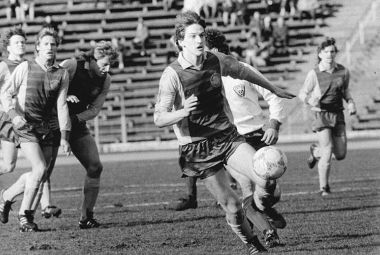 ADN-ZB-Oberst-12.3.88-mx-Berlin: Fußball-Oberliga- 16. Spieltag- BFC Dynamo - 1. FC Lok Leipzig- 0:2 (0:1)- Das Spitzenspiel zwischen Meister und Pokalsieger vor 12.000 Zuschauern stand eindeutig im Zeichen der Gäste. Hier setzt sich Frank Edmond (Lok) gegen Frank Pastor (BFC-halb verdeckt) durch. Weiter v.l.: Torsten Kracht, Ronald Kreer, Uwe Zötzsche (alle Lok).